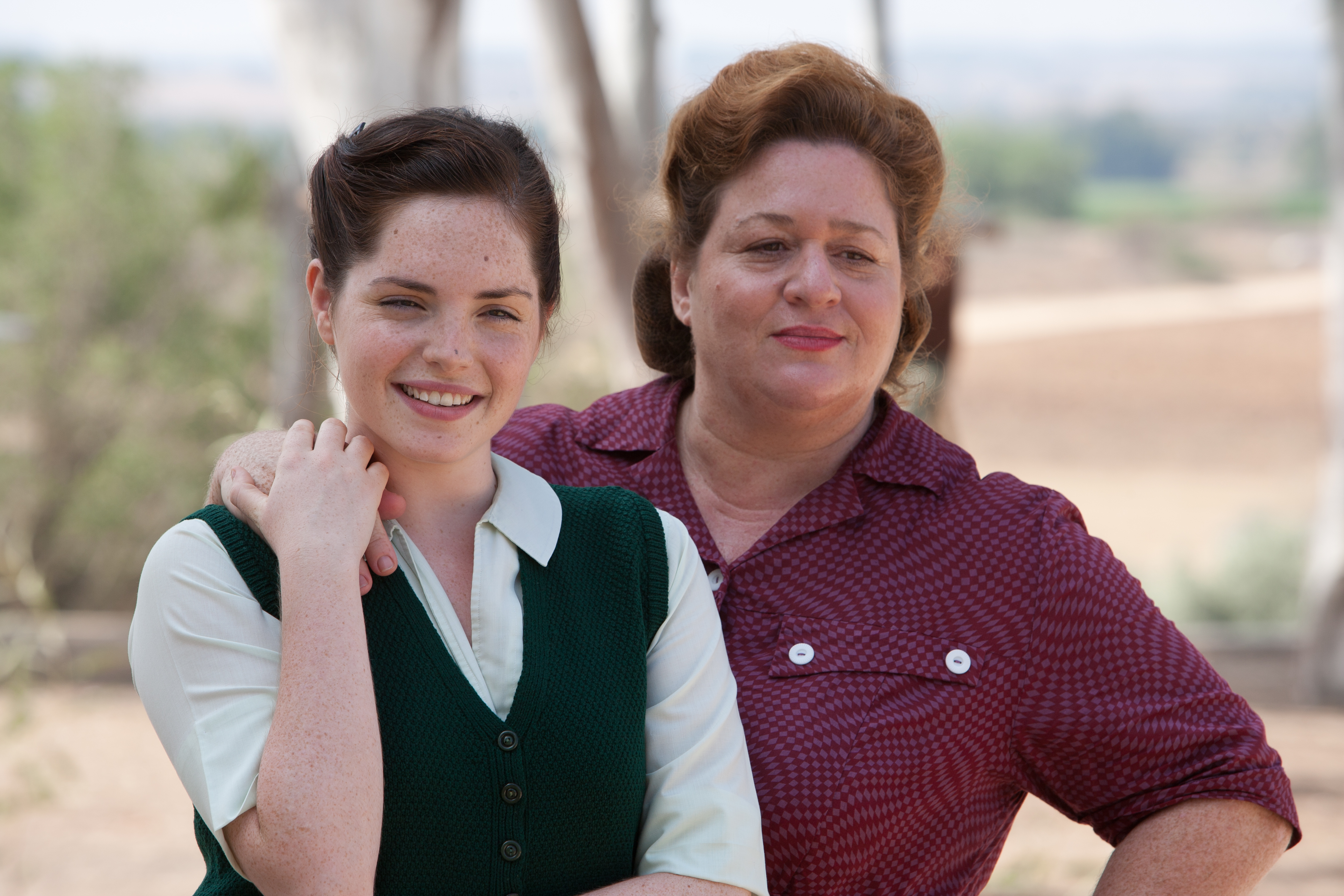 אסתי זקהיים ותמר שם אור בסרטה של דינה צבי ריקליס ברקיע החמישי